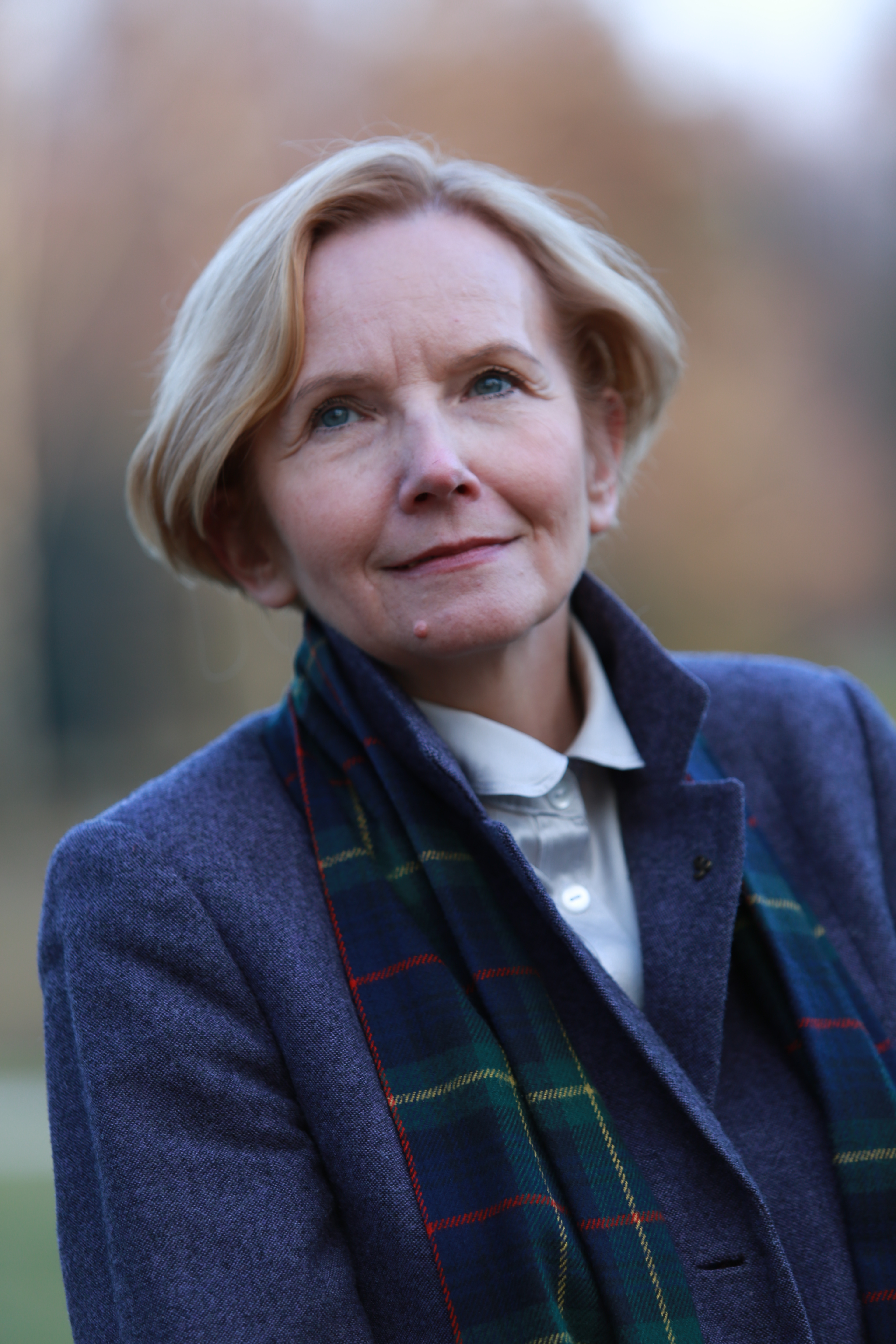 Małgorzata Dąbrowska